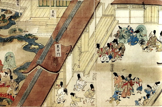 『年中行事絵巻』「闘鶏」に描かれる中門と中門廊